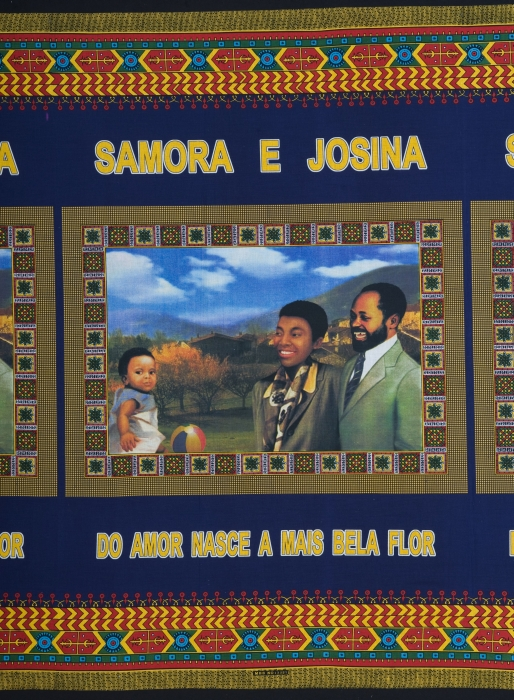 Op deze kapulana staat in drievoud een voorstelling van het gezin van Samora Machel. Machel was leider van de FRELIMO, sinds de dood van Eduardo Mondlane (1969), en werd in 1975 de eerste president van Mozambique. Op 20 oktober 1986 kwam hij om het leven, bij een wellicht opzettelijk gearrangeerd vliegtuigongeluk. De door middel van fototechniek gereproduceerde foto toont Samora Machel, zijn vrouw Graça (later echtgenote van Nelson Mandela) en een kind, gezien de tekst vermoedelijk Josina. Koptekst: Samora e Josina Ondertekst: Do amor nasce a mails bela flor (vertaling: uit liefde worden de mooiste bloemen geboren)